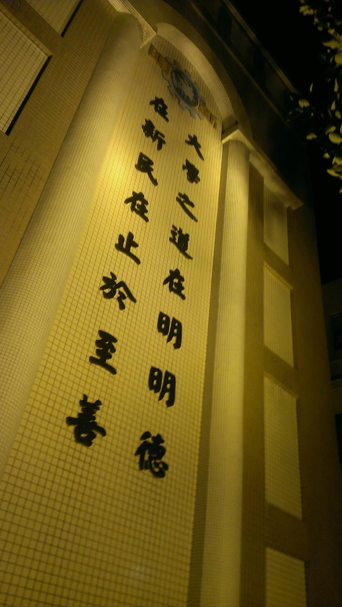 中文（台灣）: 明新科大夜晚時明學樓。